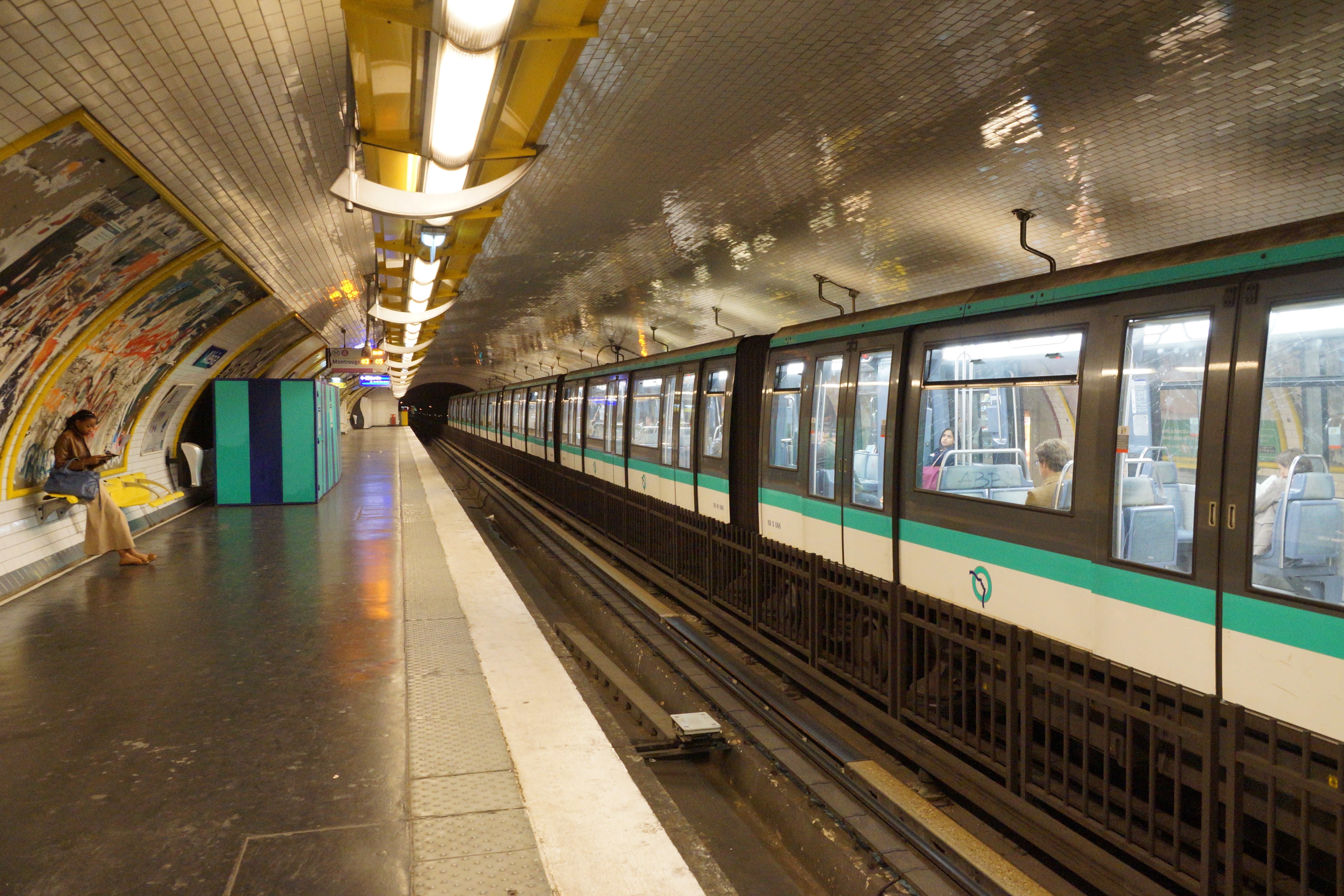 Alesia metro station, Paris.